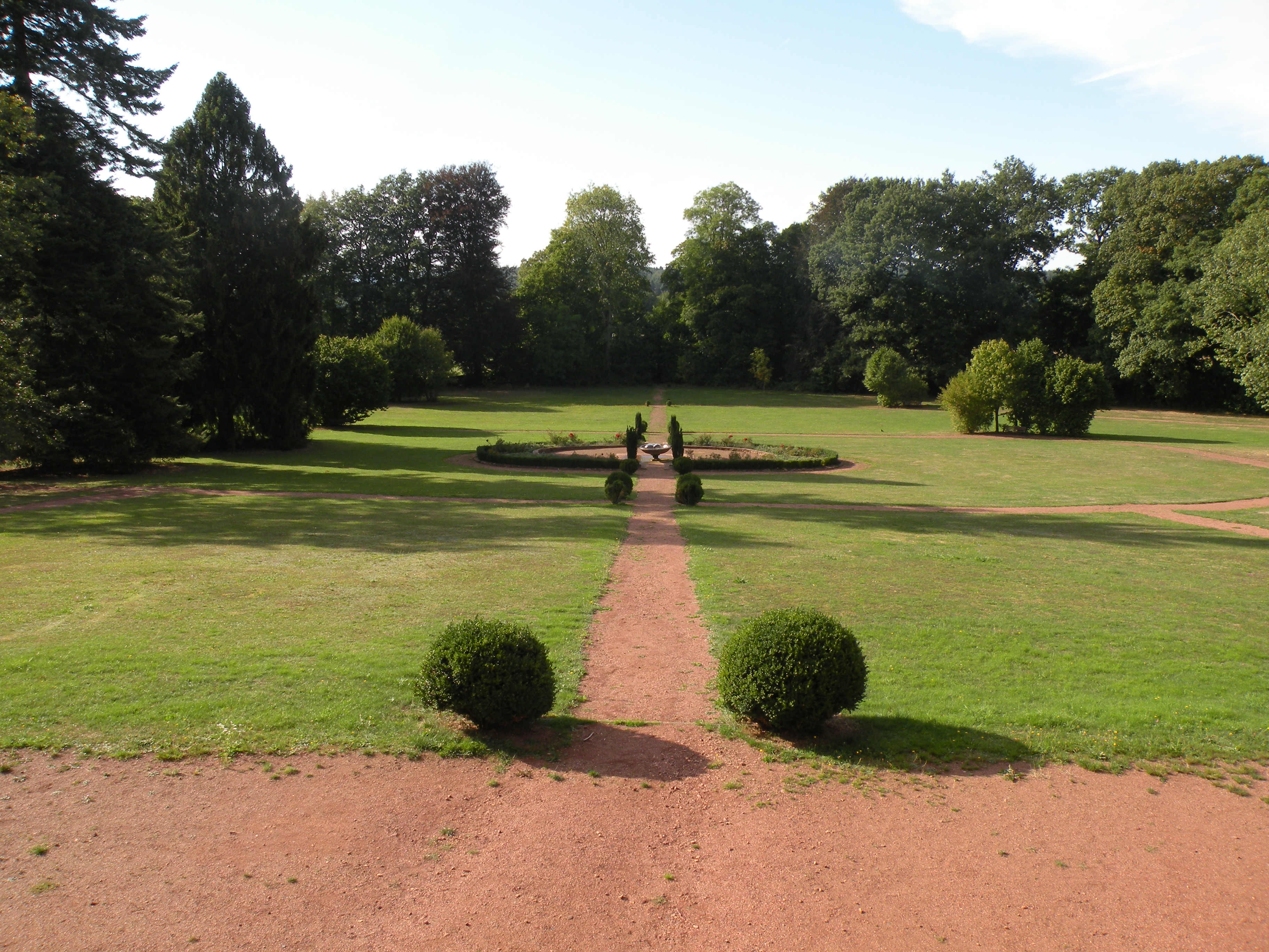 Trippstadter Schlossgarten